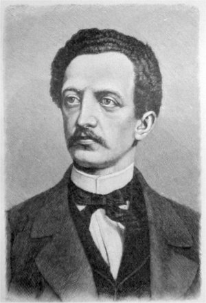 Beschreibung: Ferdinand Lassalle Quelle: Meyers Konversationslexikon, 1906 (Scan) Lizenz: Public domain 11:49, 17. Mär 2003 Magnus Manske 300 x 441 (26.845 Byte) (Aus )